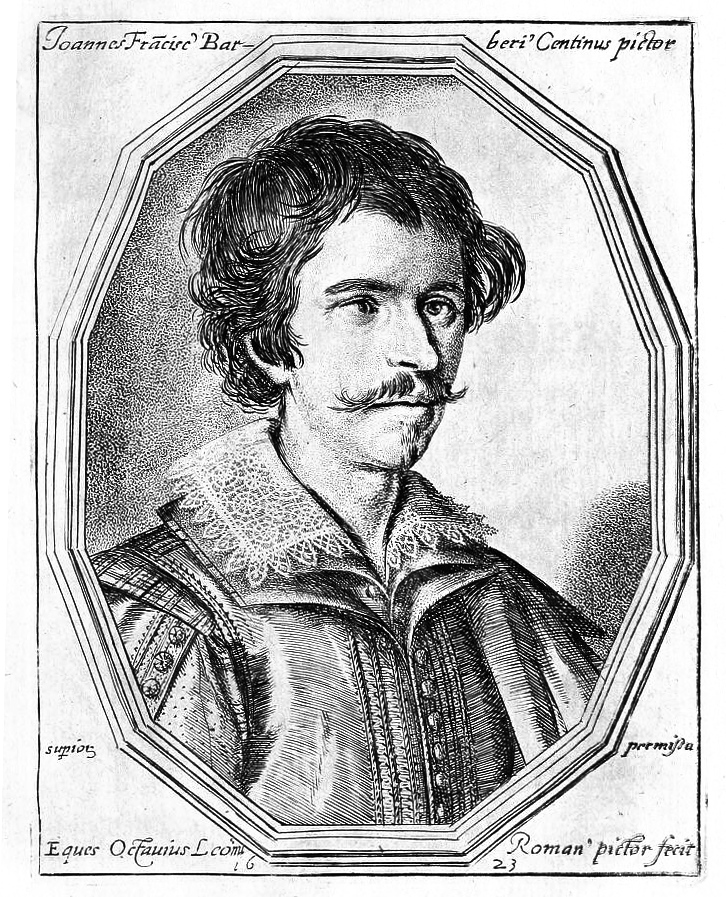 Francesco Barbieri (1623–1698)